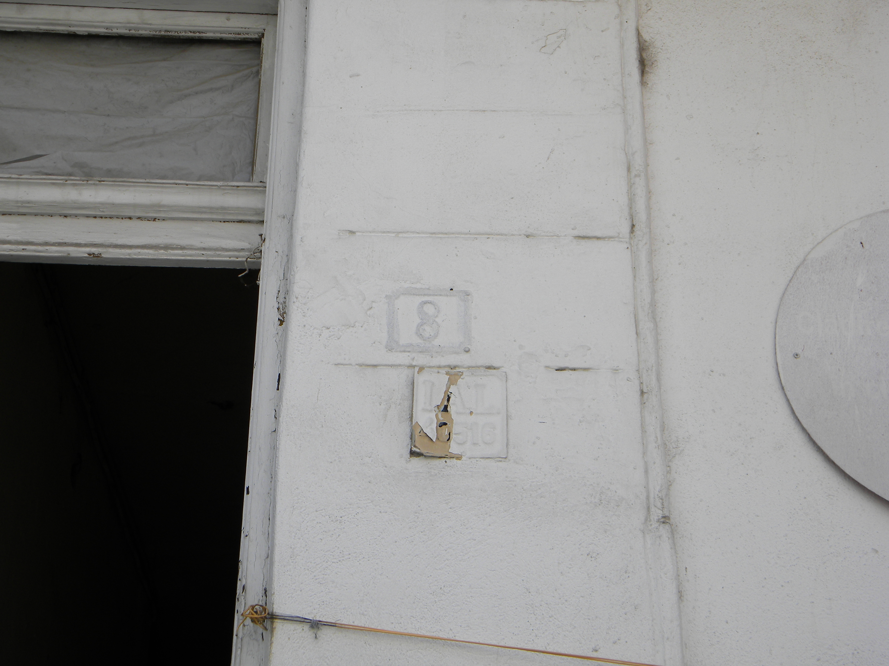 Bucuresti, Romania, Casa pe Str. Patrascu Voda nr. 8; B-II-m-B-19371 (detaliu 1)